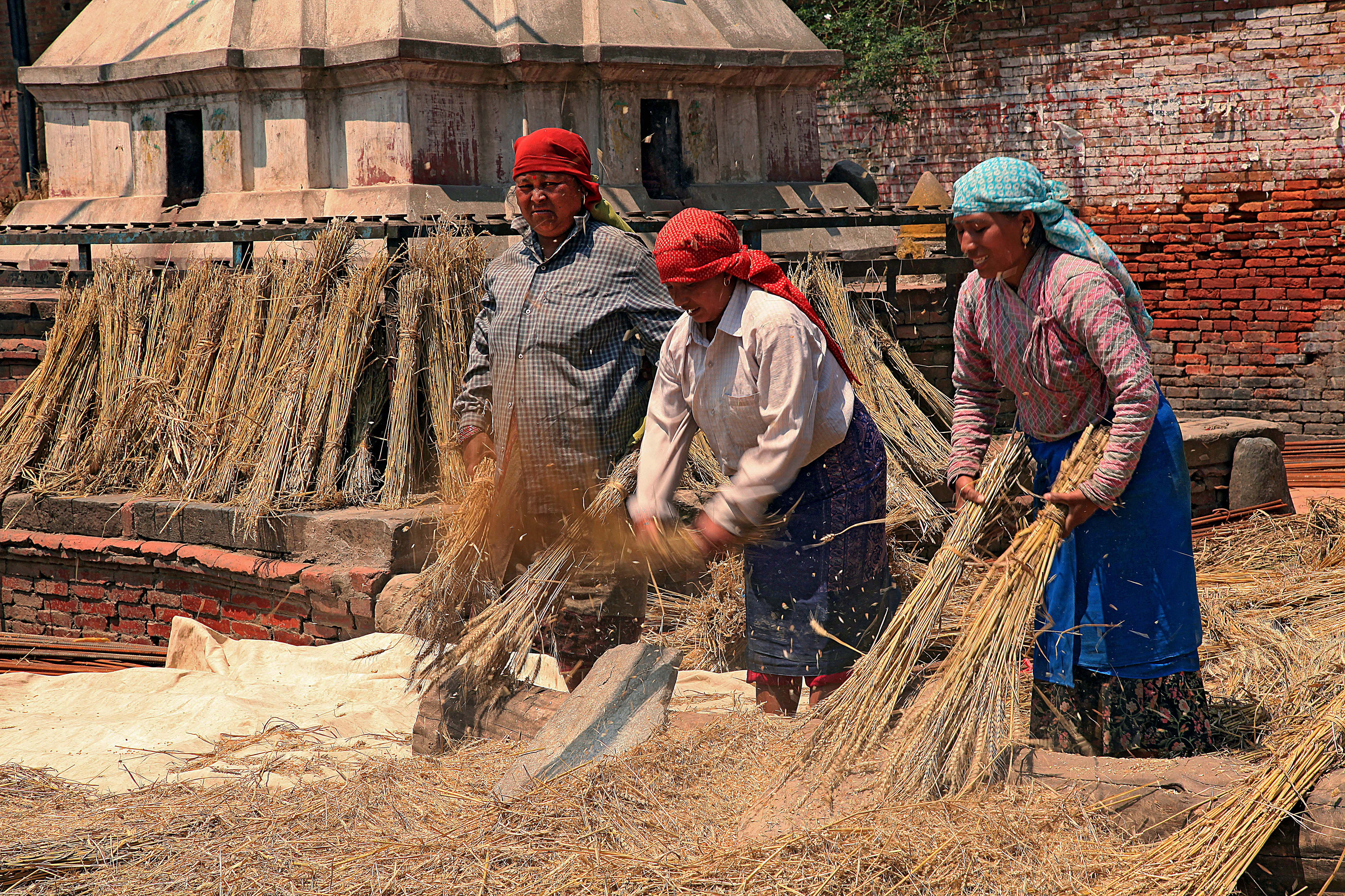 Nepalesische Frauen beim Dreschen von Weizen